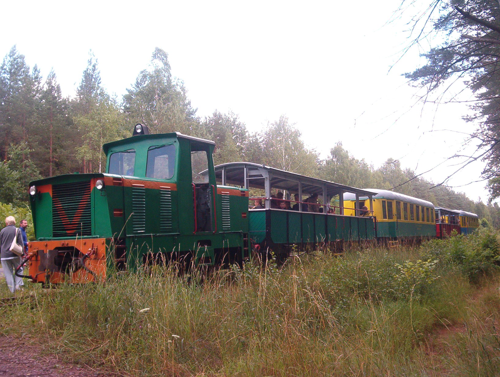 Ełcka Kolej Wąskotorowa